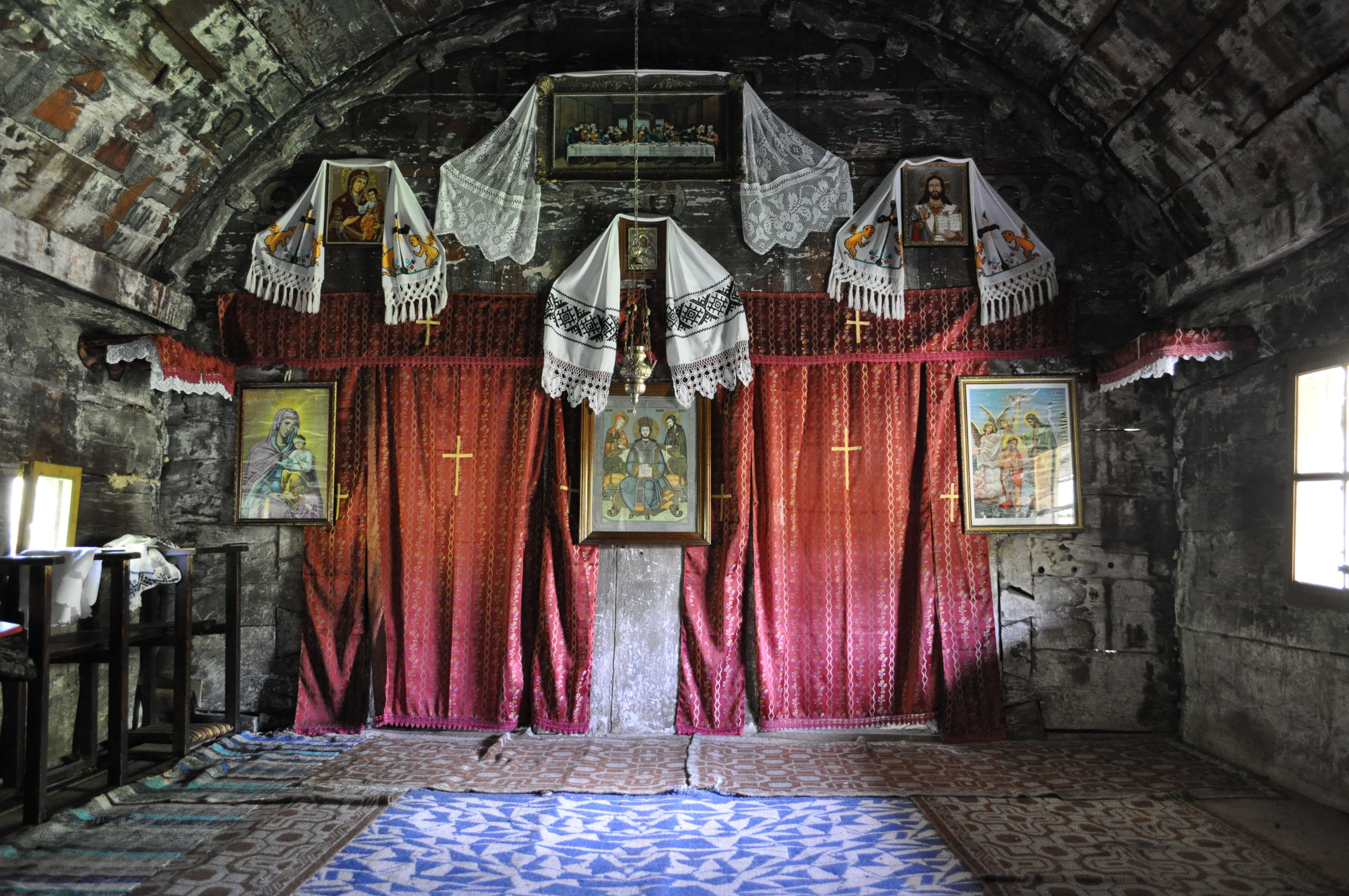 Biserica de lemn din Stolna, județul Cluj